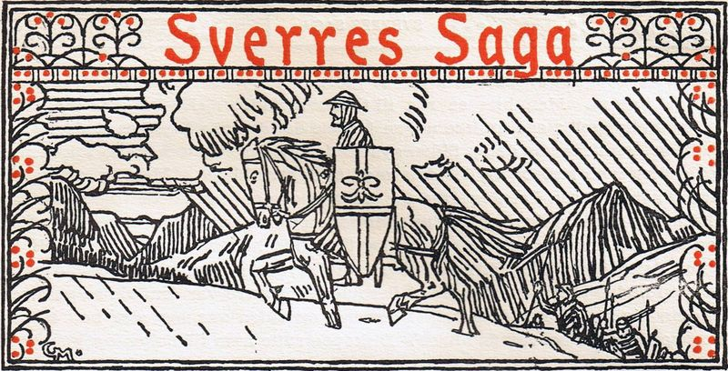 Tittelfrise til Sverres saga, ill. Gerhard Munthe